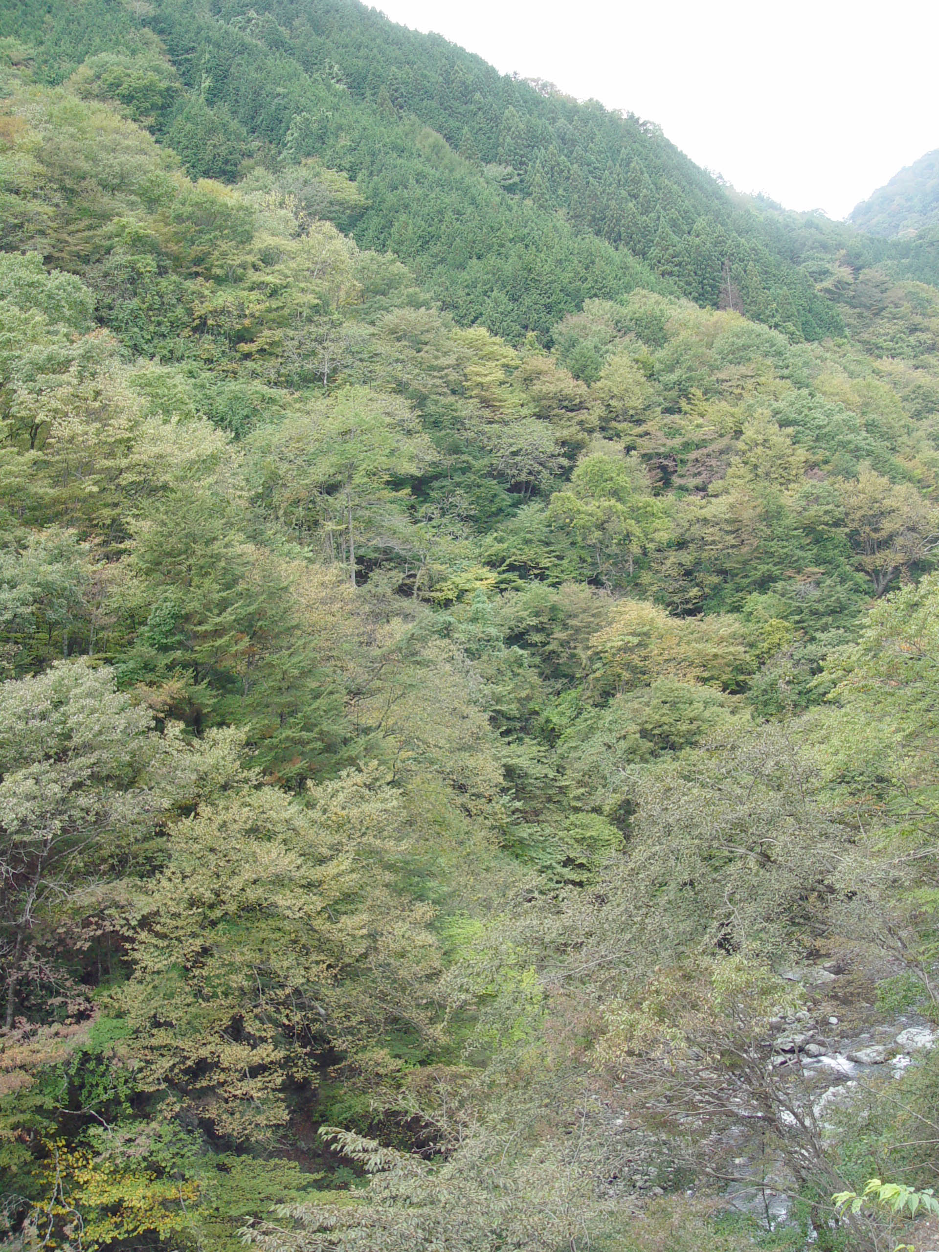 Tama River, Tabayama, Yamanashi, Japan多摩川上流（丹波川）、丹波山村